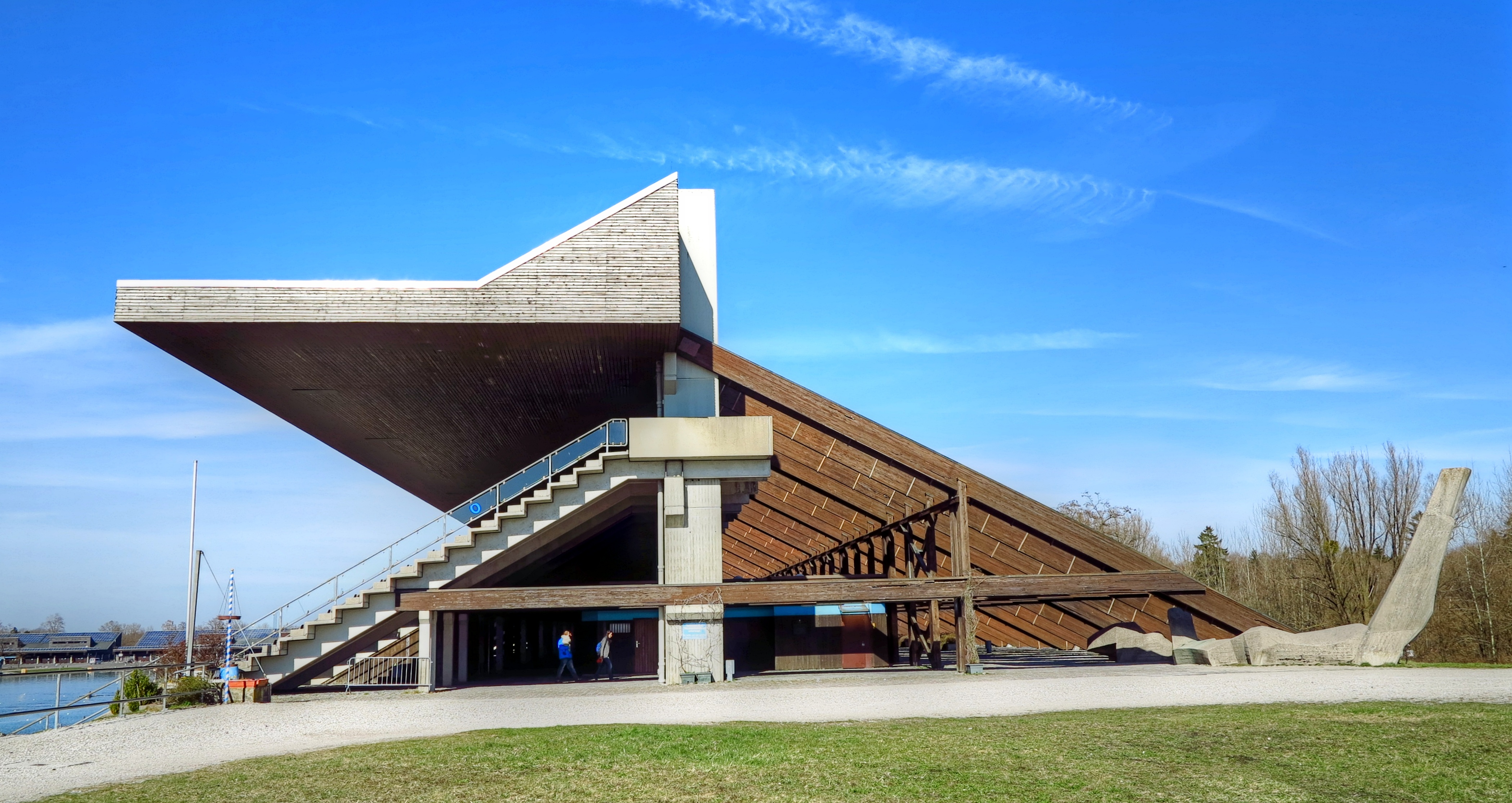 Deutschland, Bayern, Oberschleißheim, Ruderregatta-Anlage, Tribüne, Südseite